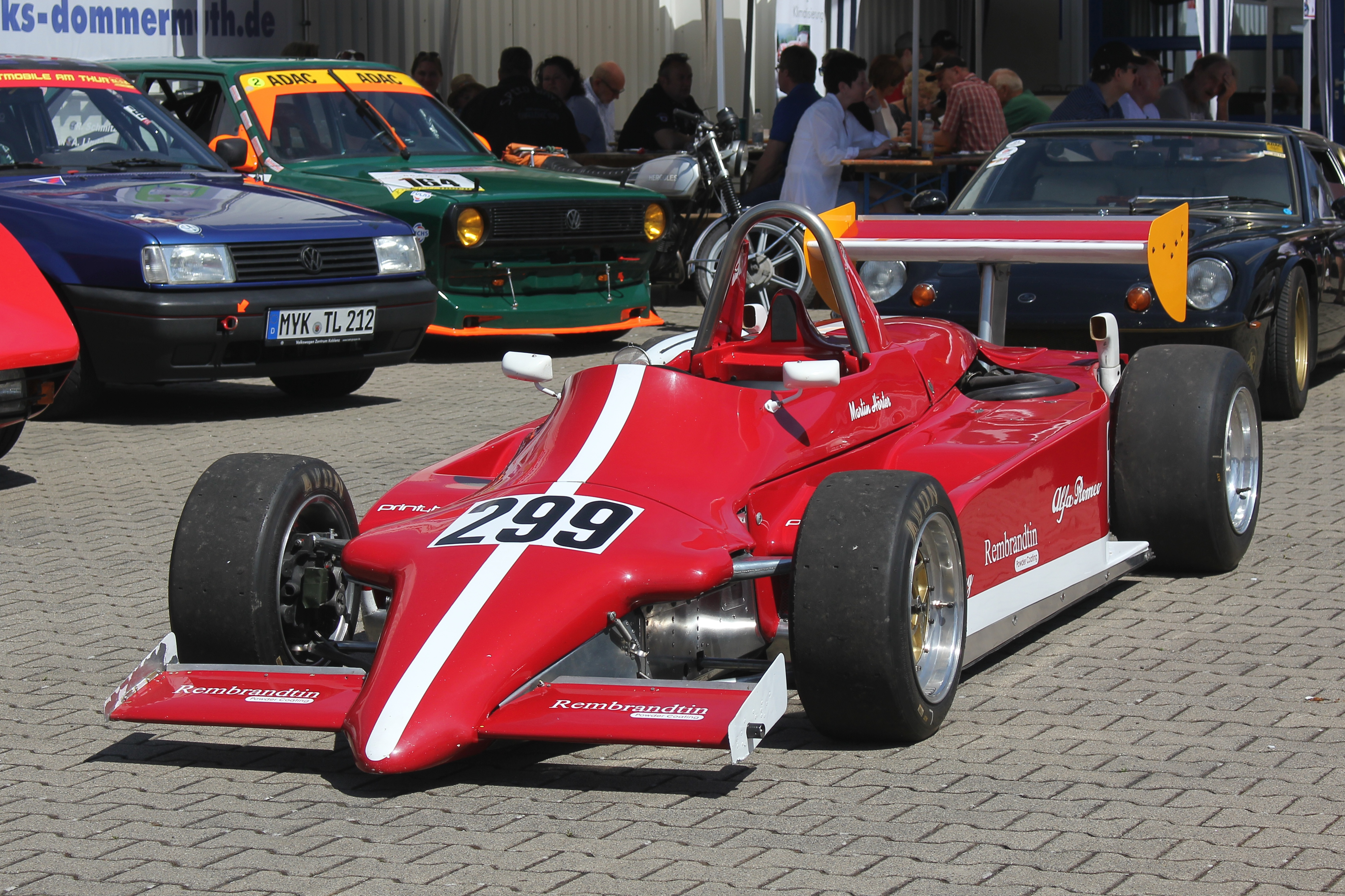 Formel-3-Wagen Ralt RT 3-82 mit Alfa-Romeo-Motor beim Oldtimertreffen des Automobilclubs Mülheim-Kärlich